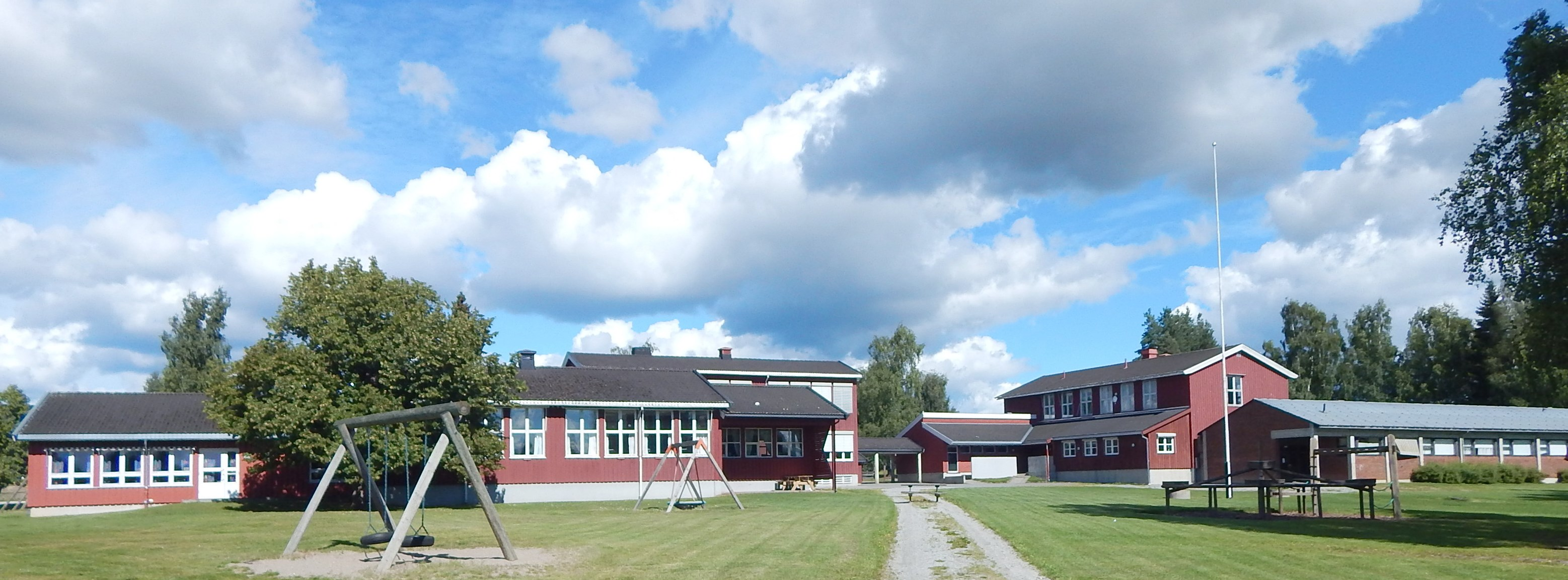 Breidablikk skole på Ilseng